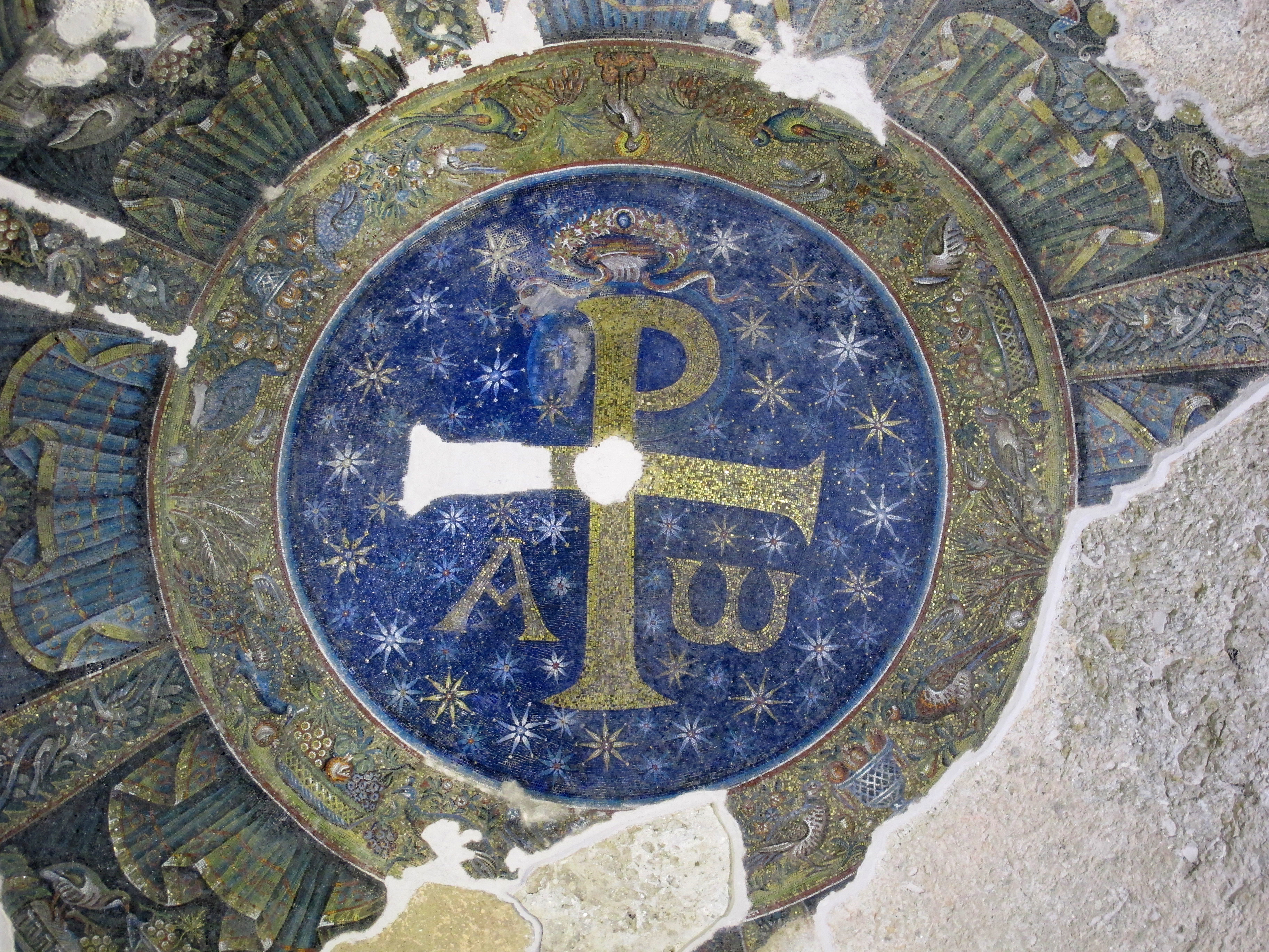 Battistero di San Giovanni in Fonte (Napoli)